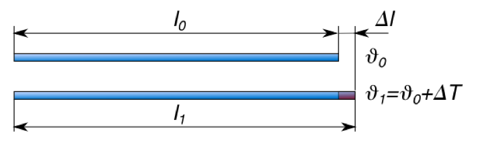 Längenausdehnung